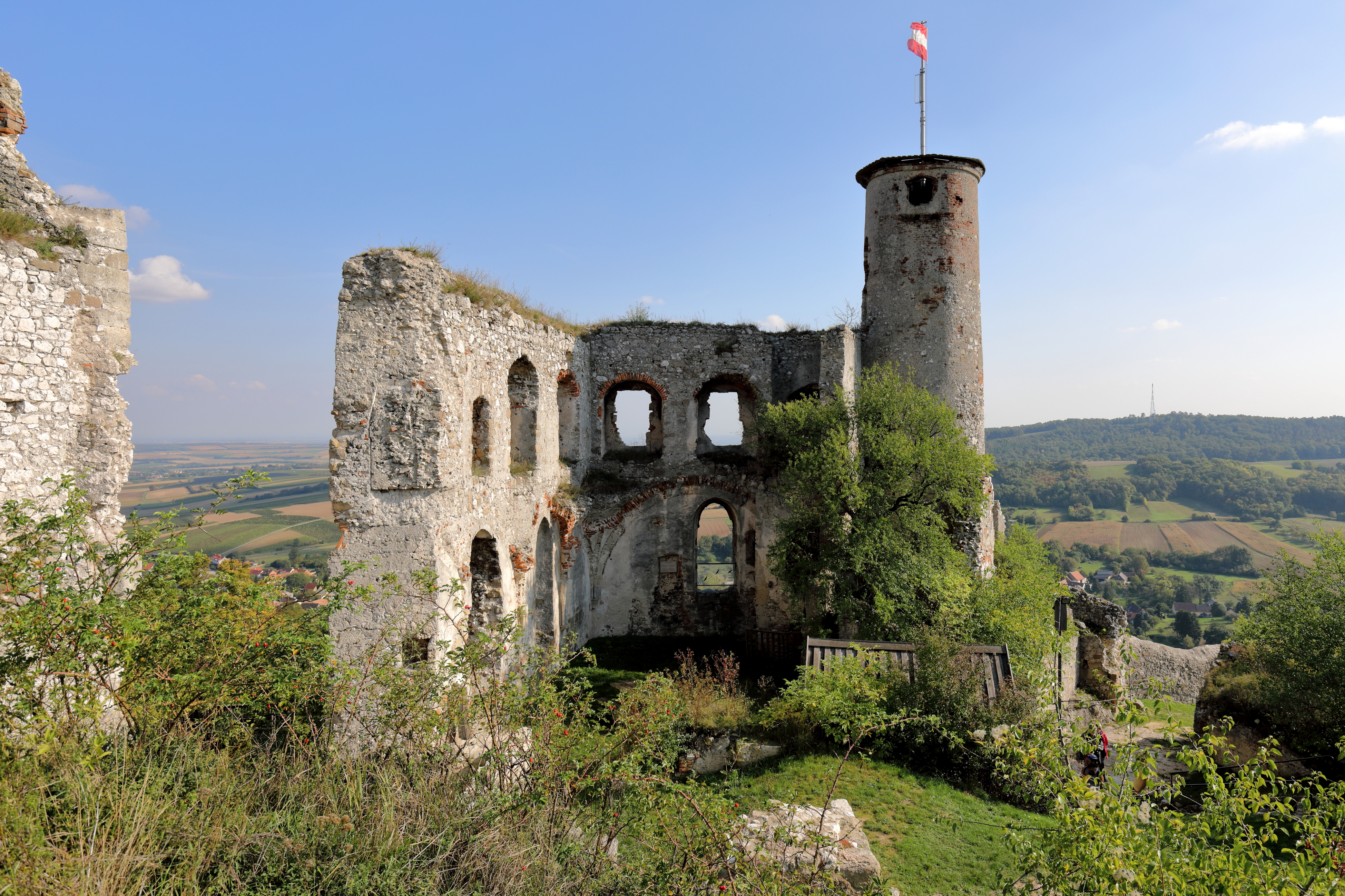 Der Rest des Palas der Burg Falkenstein in der niederösterreichischen Marktgemeinde Falkenstein mit dem Kapellenturm sowie rechts davon der Rest des ursprünglichen Burgtores.Der Palas wurde in der 2. Ausbaustufe errichtet und wurde auf einem künstlichen, abgestemmten Felsenplateau vor der ältesten Ringmauer errichtet. Der Kapellenturm dürfte in Ergänzung zur Kapelle als Glockenturm im 16. bzw. 17. Jahrhundert entstanden sein.